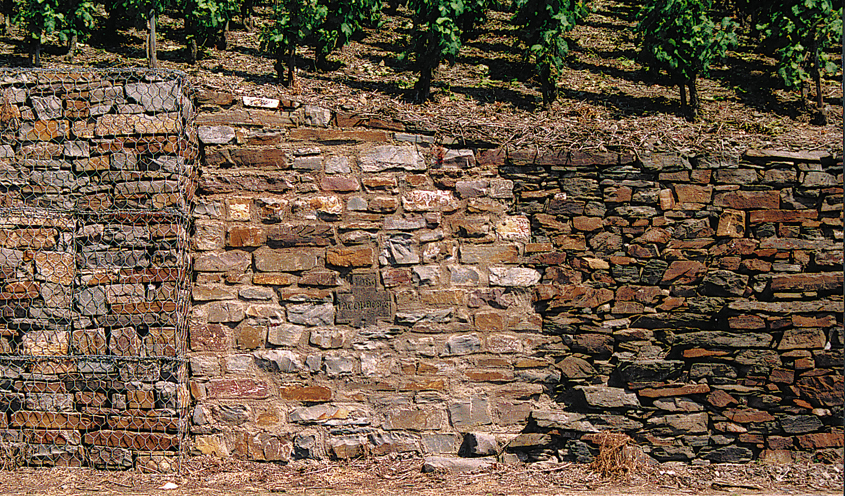 Die drei heute häufigsten Terrassenmauer-Konstruktionen